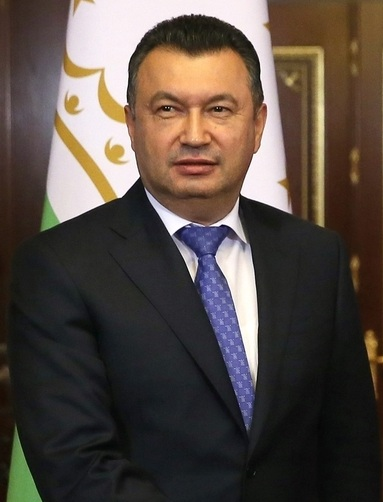 Премьер-министр Республики Таджикистан Кохир Расулзода